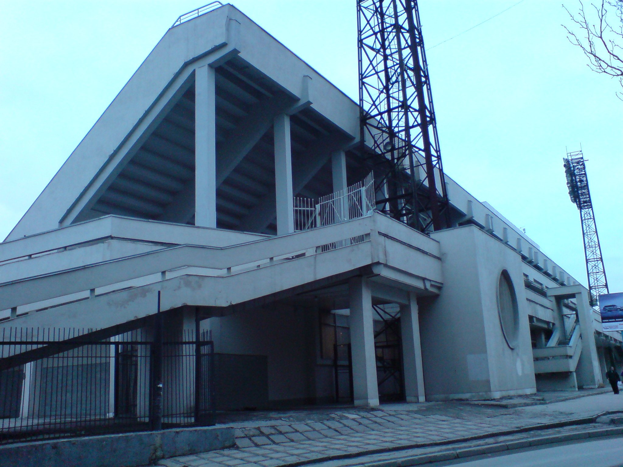 Фасад восточной трибуны стадиона Локомотив (Саратов)